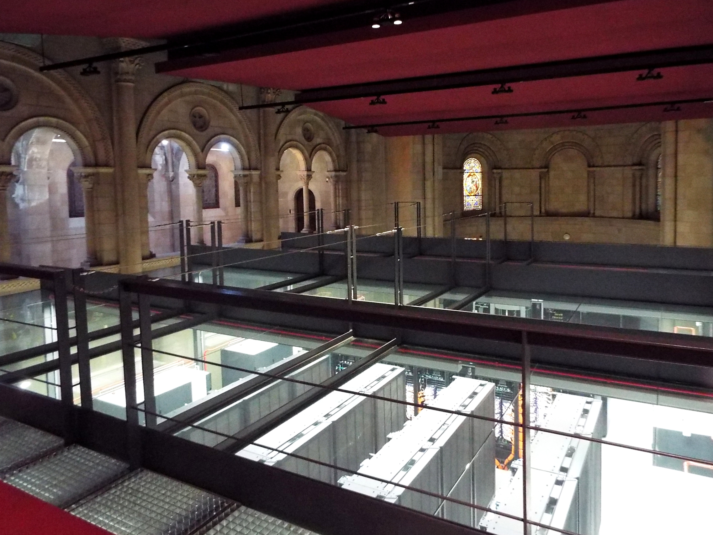 Planta superior del supercomputador MareNostrum III, situado en la antigua capilla junto a la Torre Girona, en el Barcelona Supercomputing Center-Centro Nacional de Supercomputación, España.